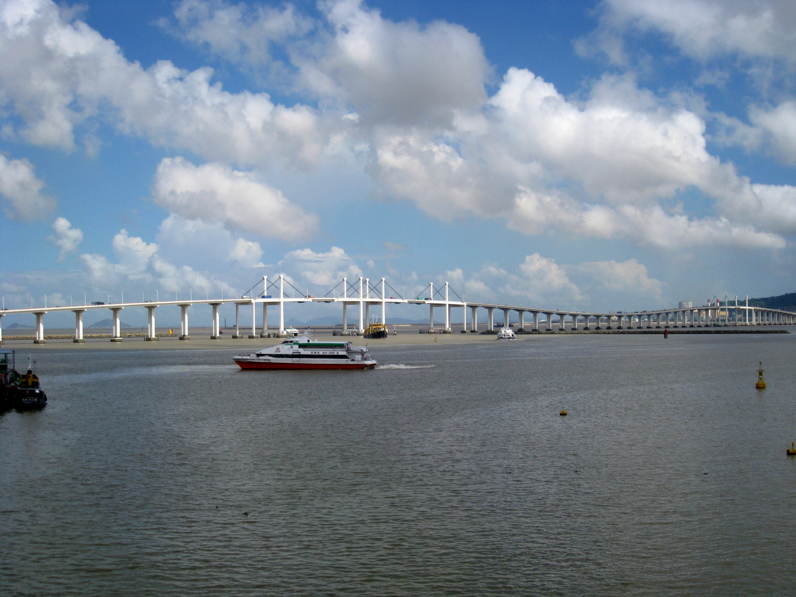 Friendship Bridge in Macau (Ponte de Amizade) 澳門友誼大橋